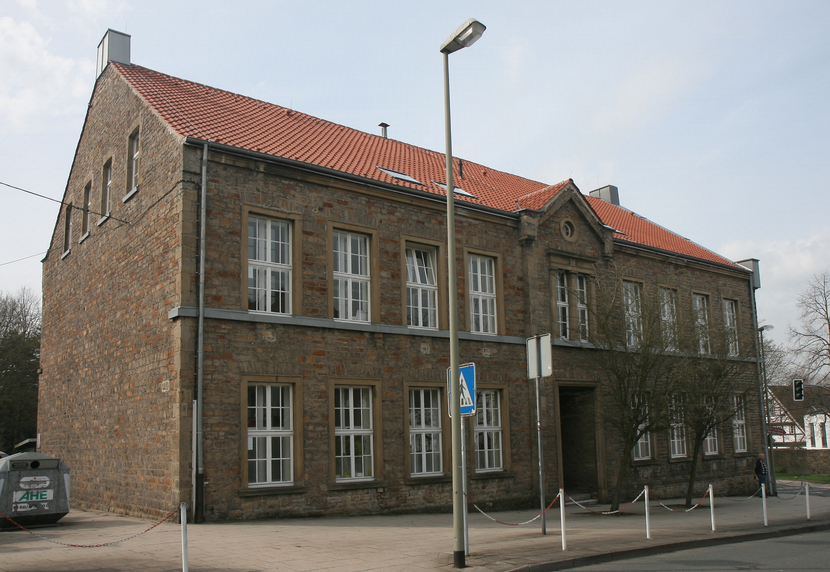 Holschentorschule (jetzt Gebäude der St.-Georg-Schule) in Hattingen, Talstraße 8. This image shows a heritage building in Germany, located in the North Rhine-Westphalian city Hattingen (no. A-141).